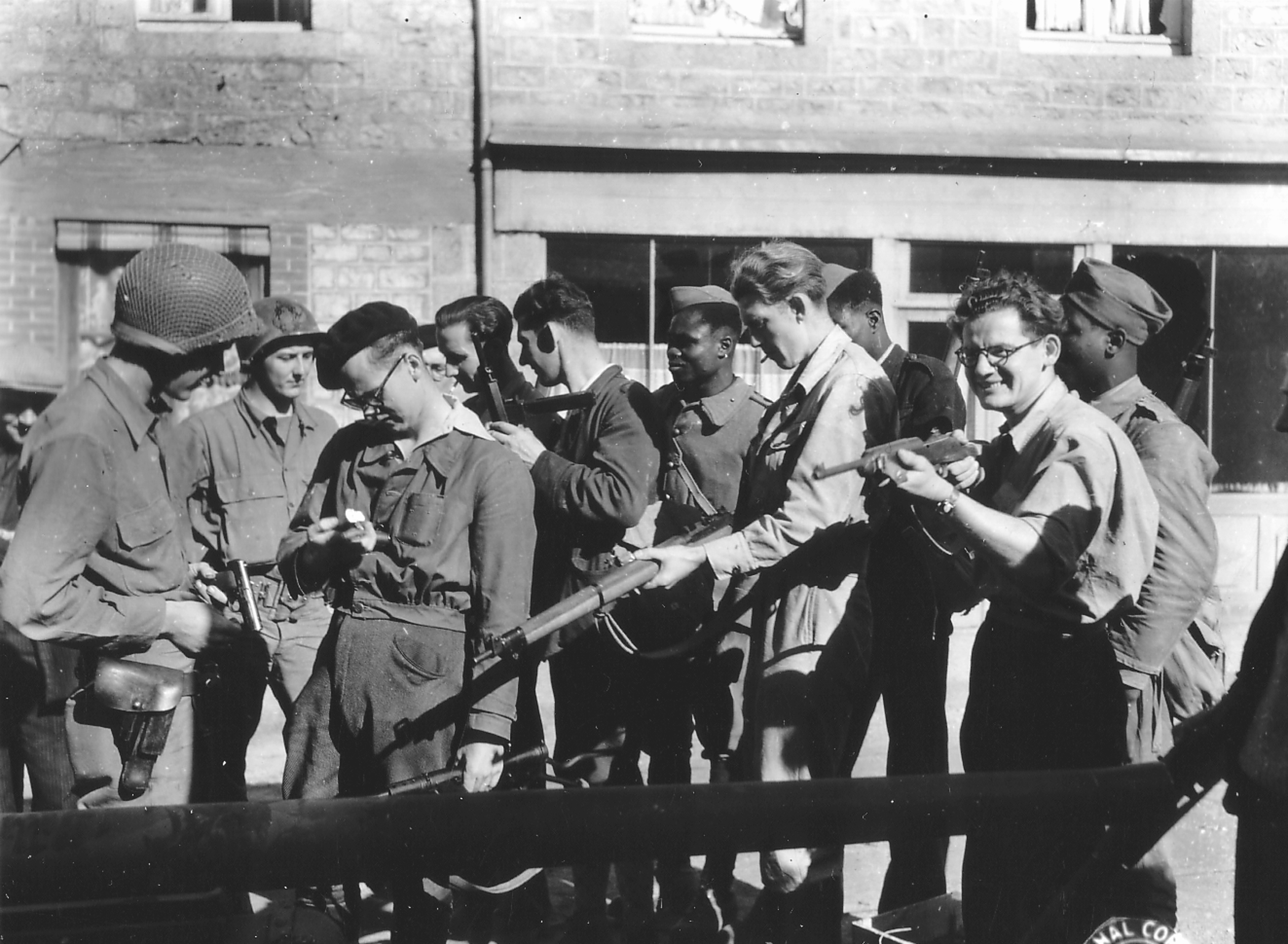 Des soldats américains et français comparant leurs armes à Couterne dans l'Orne en 1944.